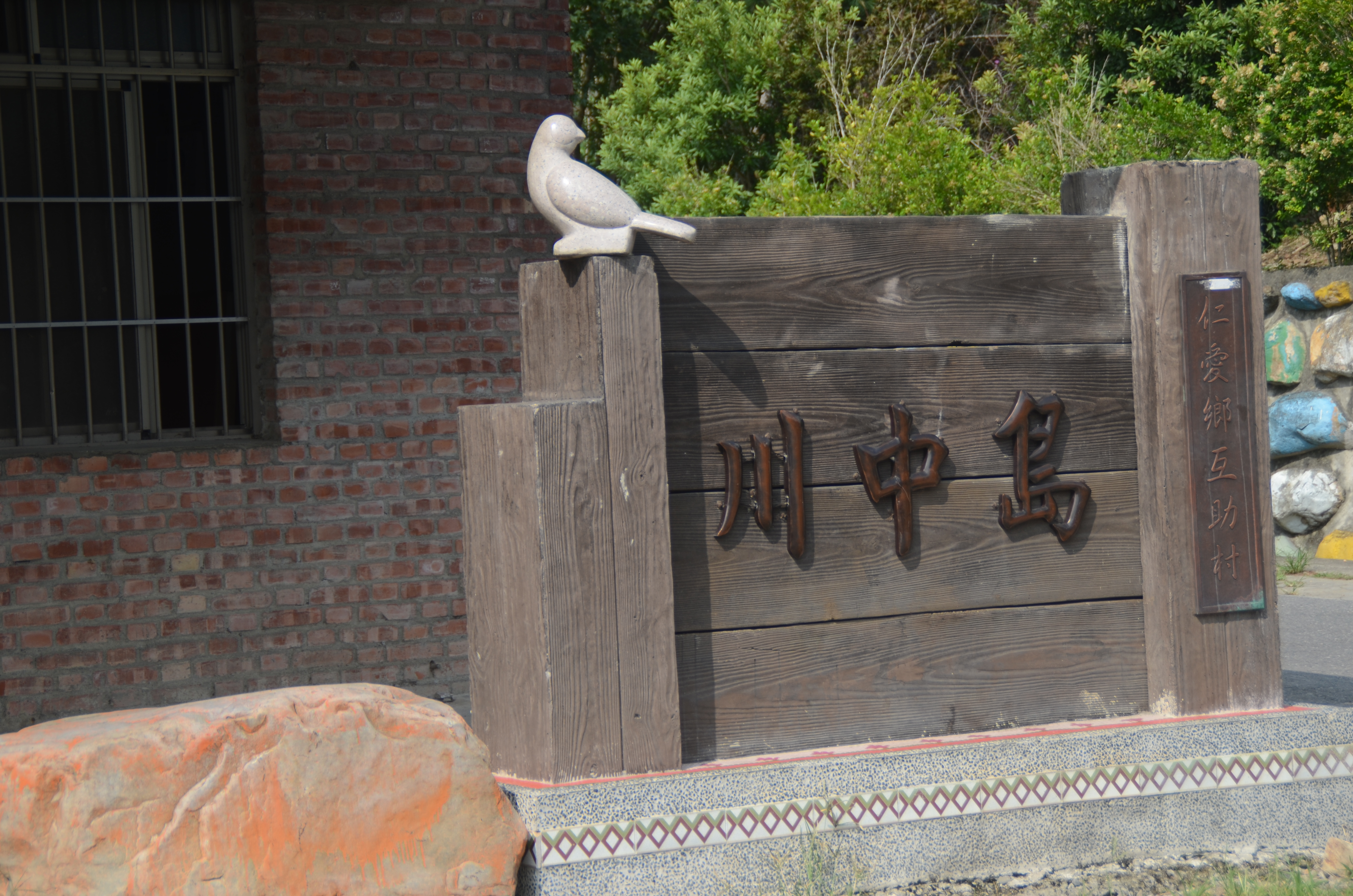 中文（台灣）: 霧社事件餘生紀念館用以紀念霧社事件的始末，與紀錄先民的遷徙歷史，於921後興建完成。